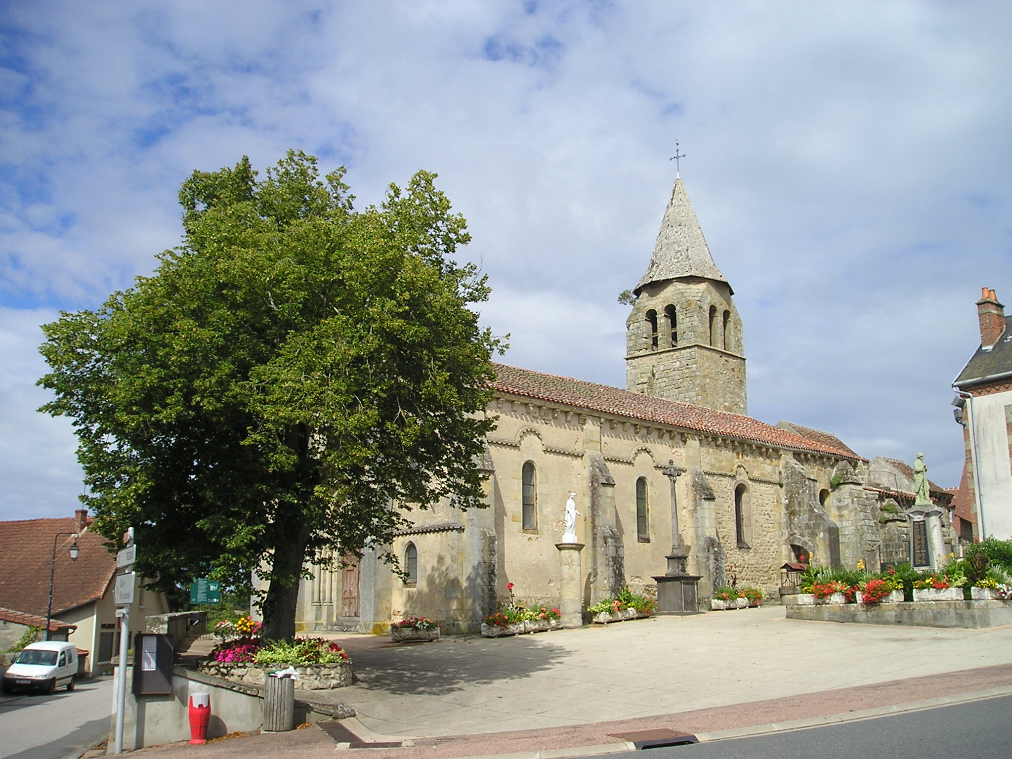 Deux-Chaises, Église St-Denis.